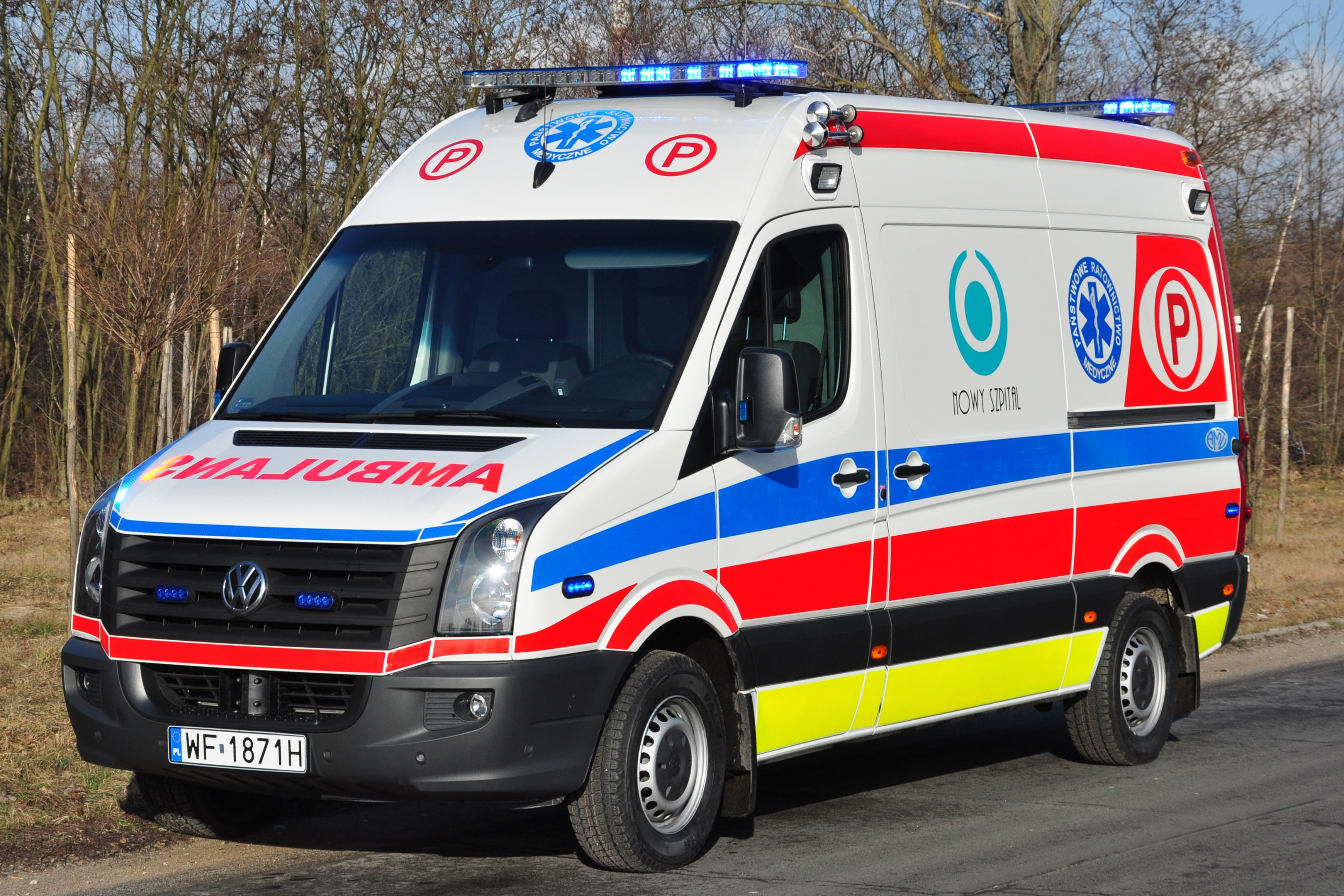 Ambulans na bazie Volkswagena Craftera przygotowany przez AMZ Kutno